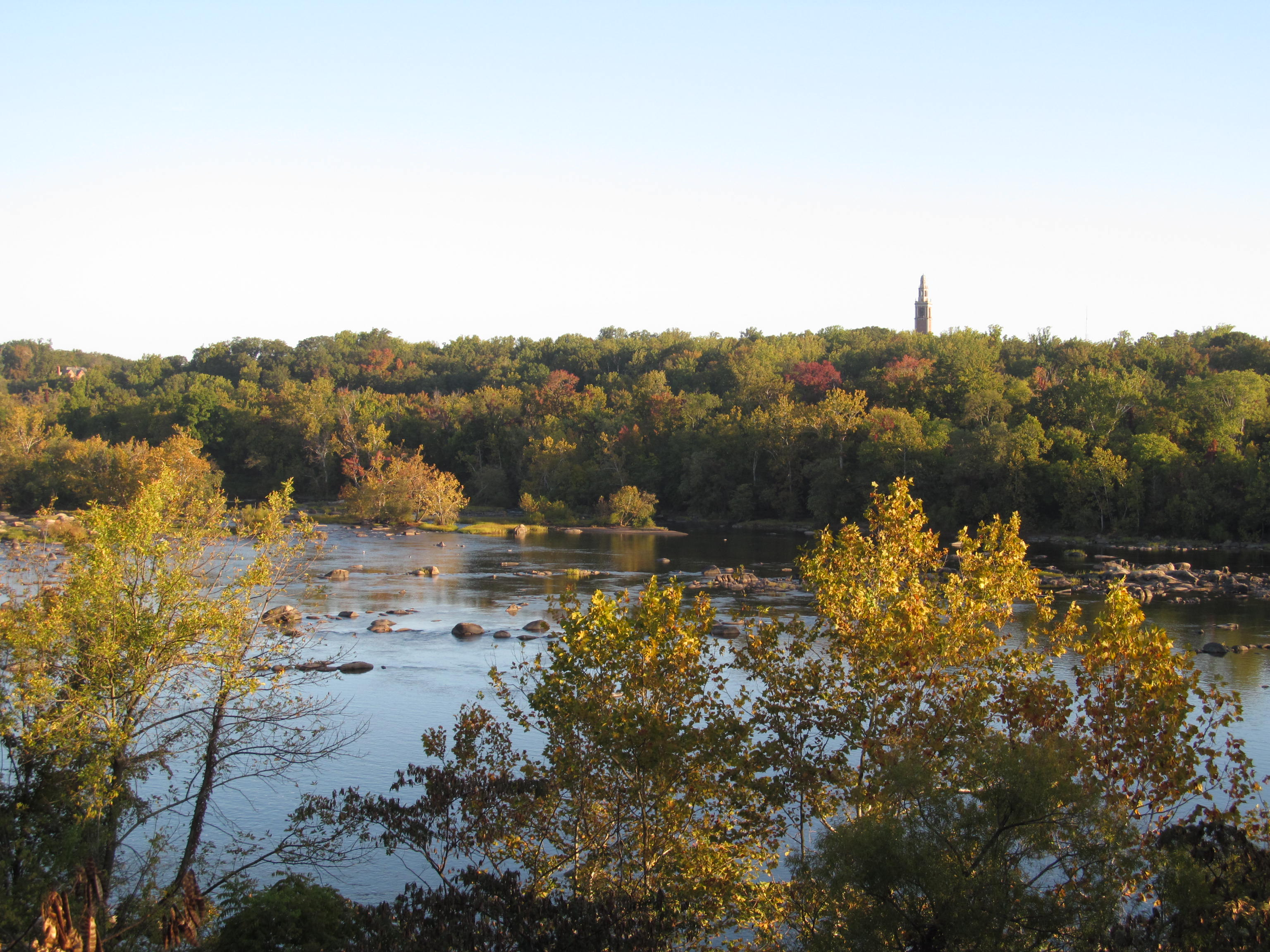 Richmond, Virginia